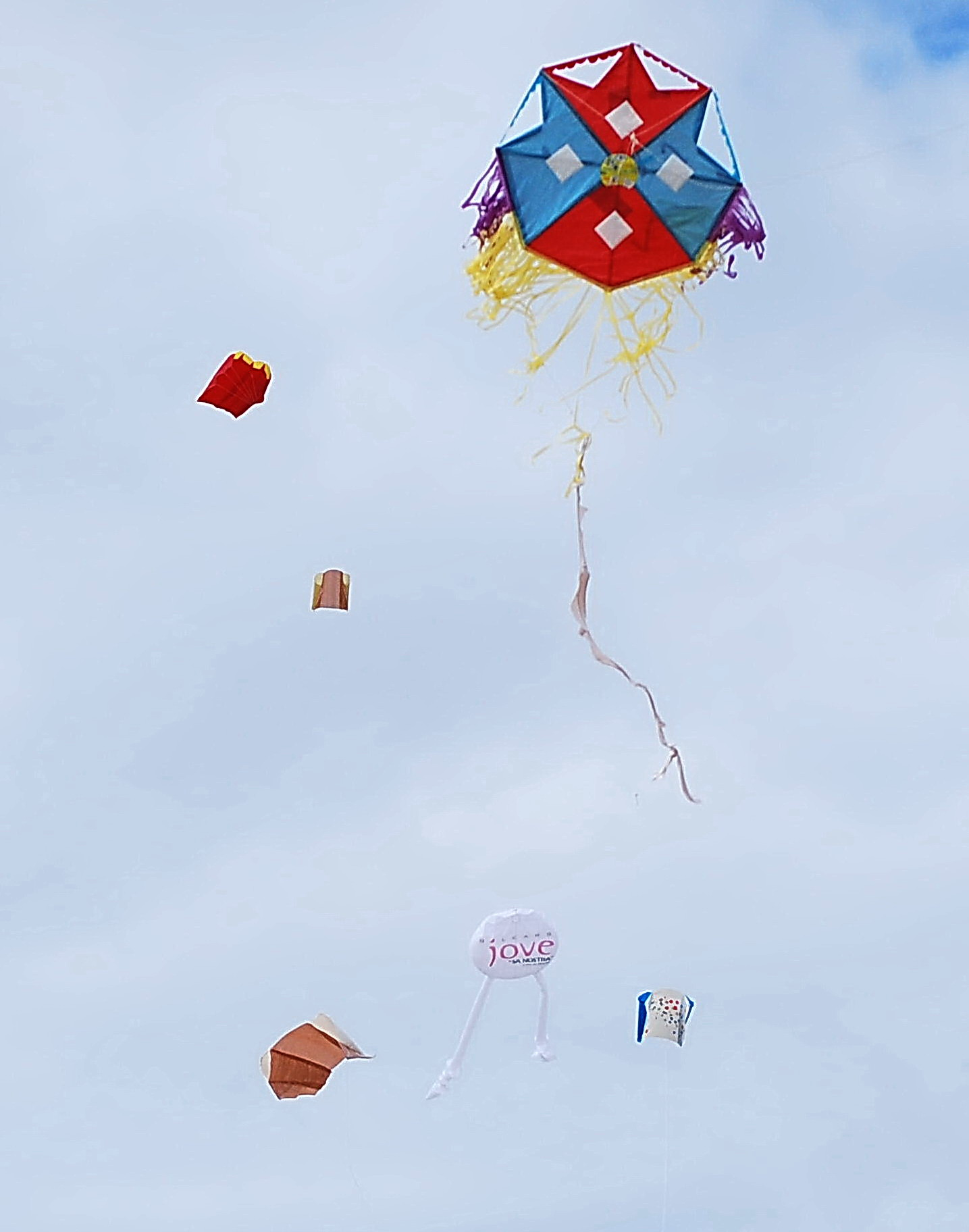 munt d´estels